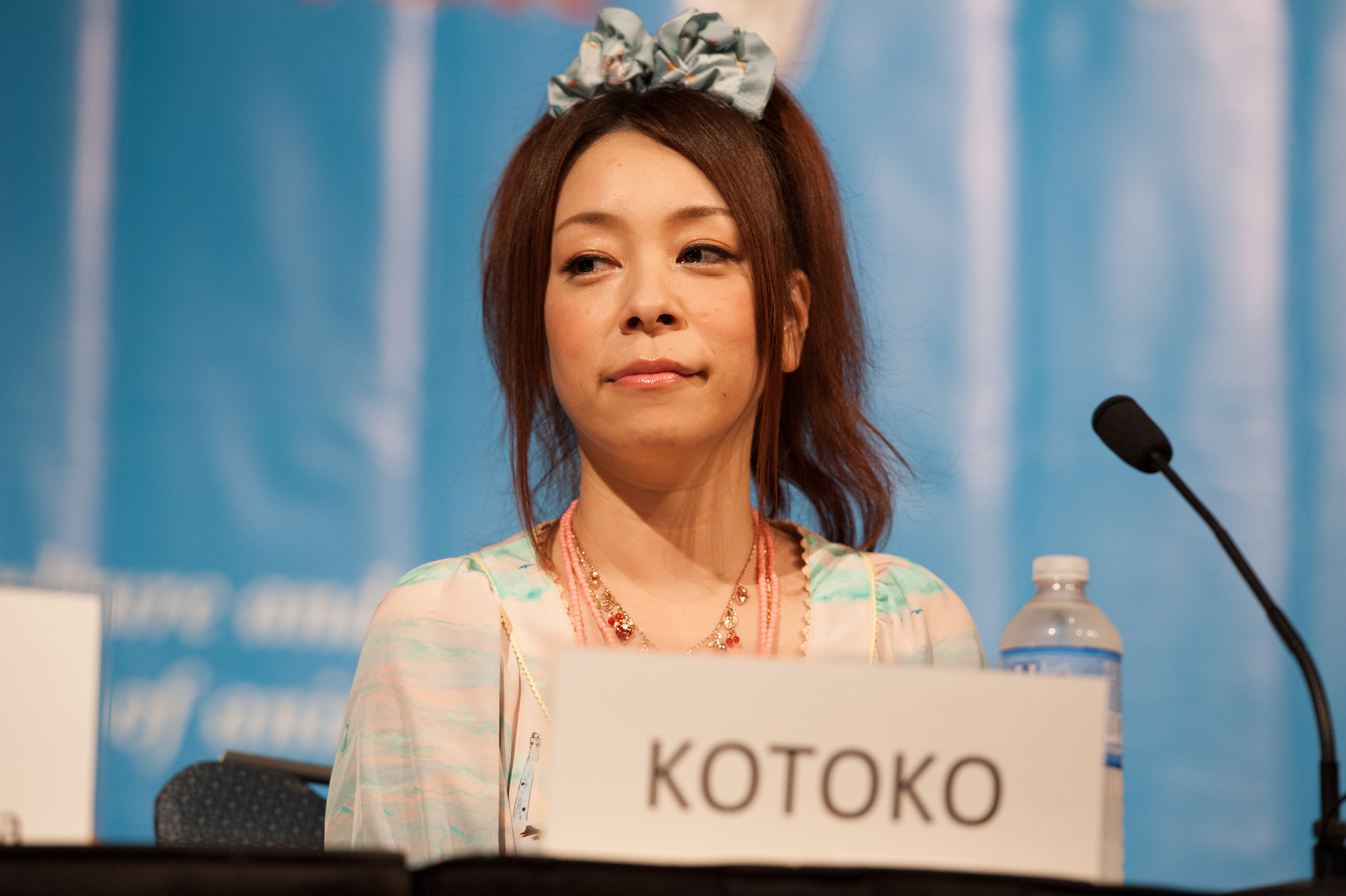 KOTOKO